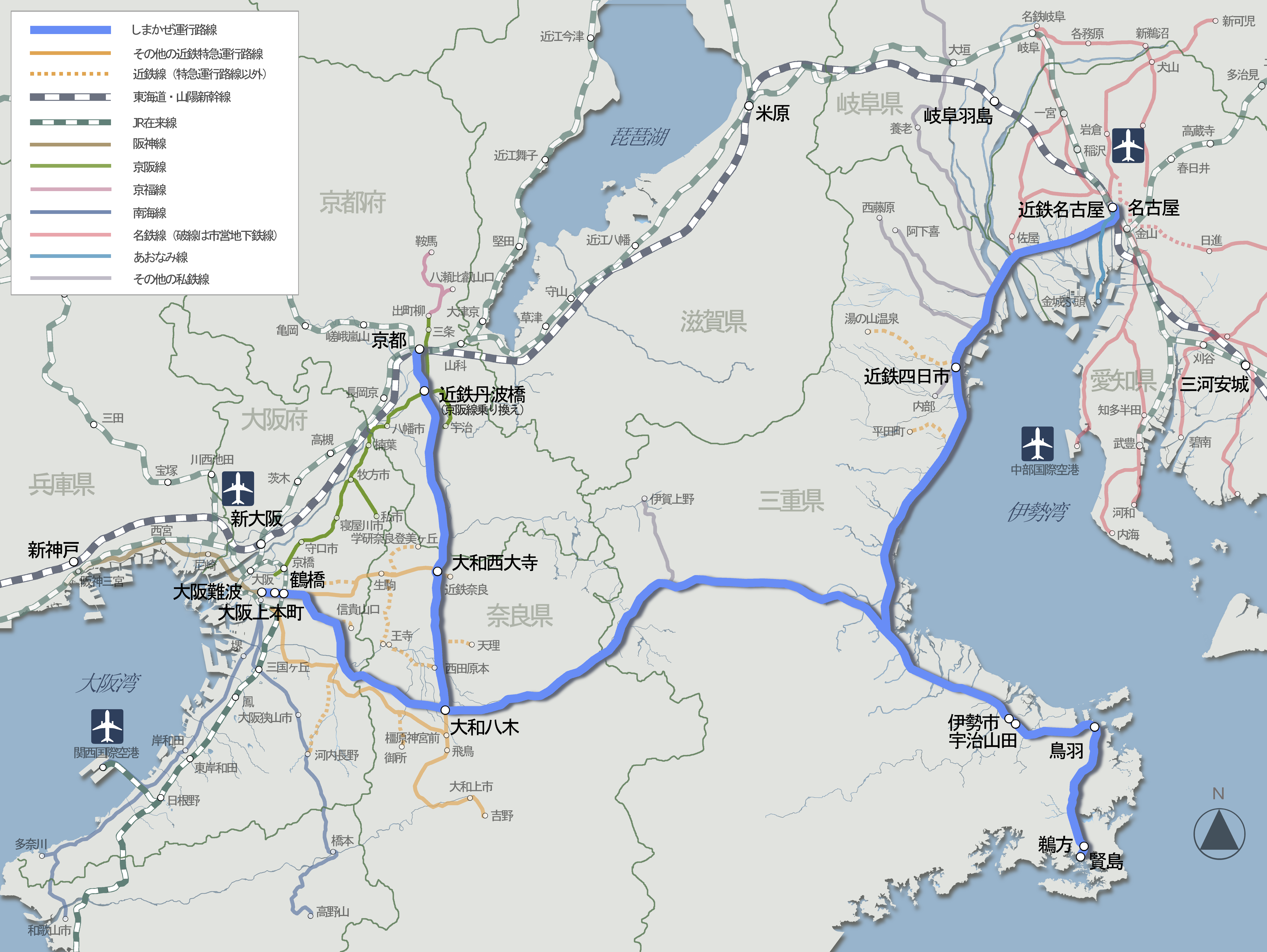 近鉄特急しまかぜのﾙｰﾄﾏｯﾌﾟ 2014年10月10日以降